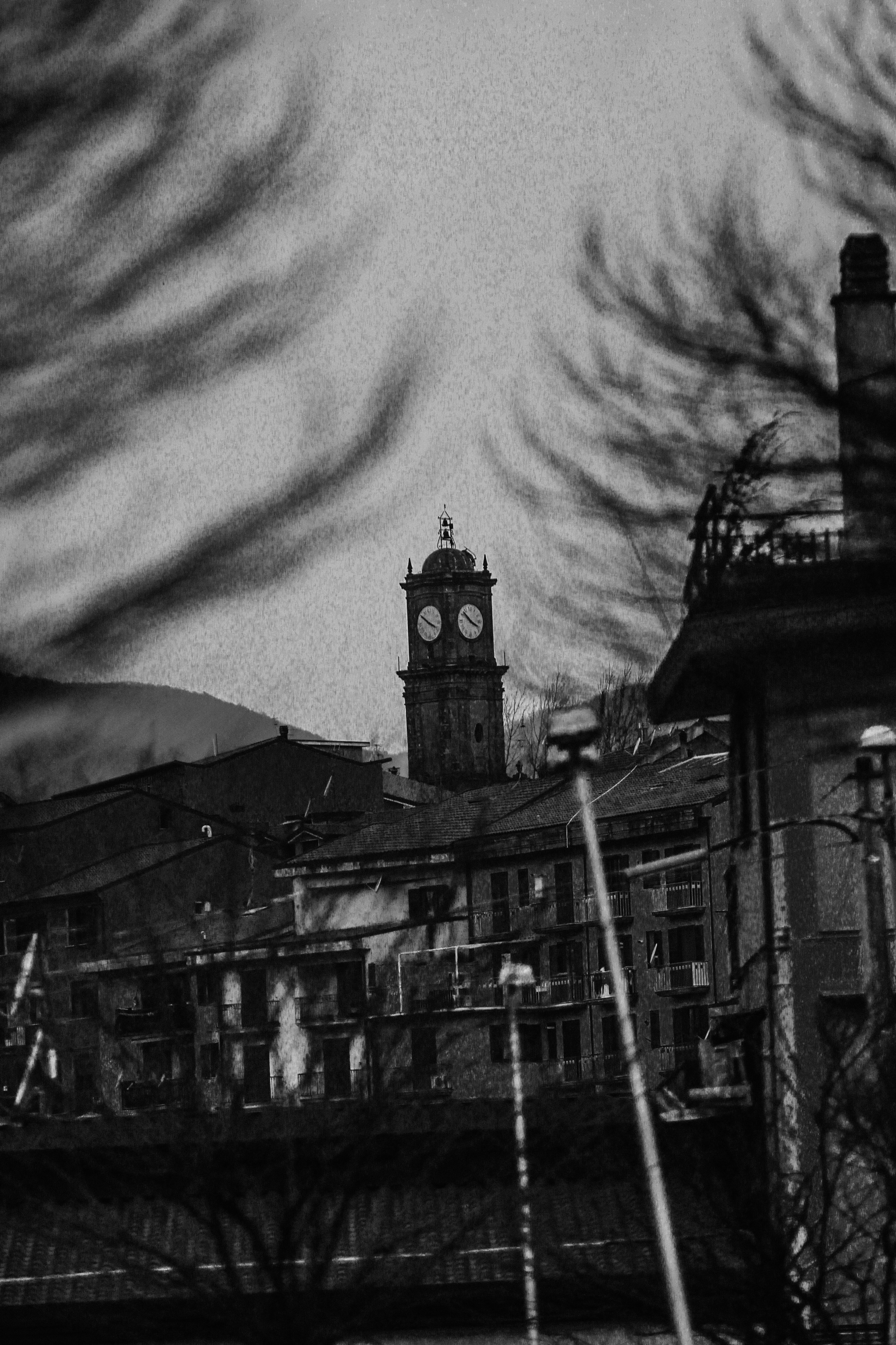 Torre dell'Orologio This is a photo of a monument which is part of cultural heritage of Italy.